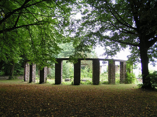 Das „Ruhrkämpferehrenmal” in Essen-Horst, für Gefallene der Freikorps, Einwohnerwehren, und der Reichswehr. Eingeweiht 1934 versuchten hier die Nazis im Dritten Reich die Ereignisse von 1918-1920, auch die Kämpfe im Ruhraufstand nach ihrer Sicht zu deuten.